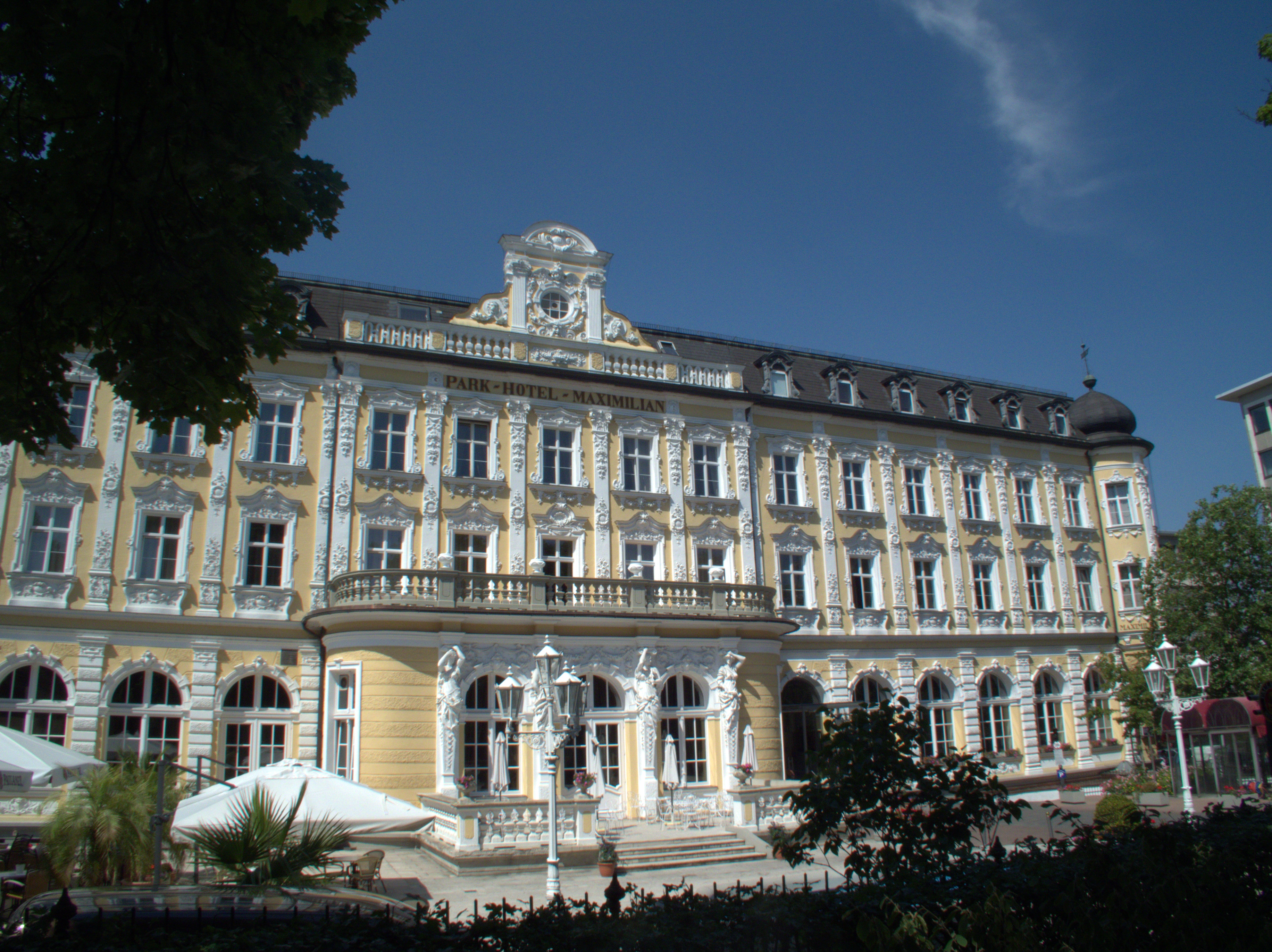 Park-Hotel Maximilian, Regensburg in der Maximilianstraße